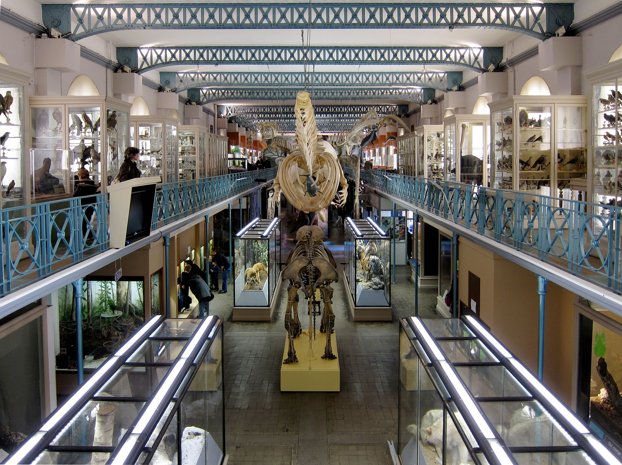 La galerie du musée d'histoire naturelle de Lille (Nord).